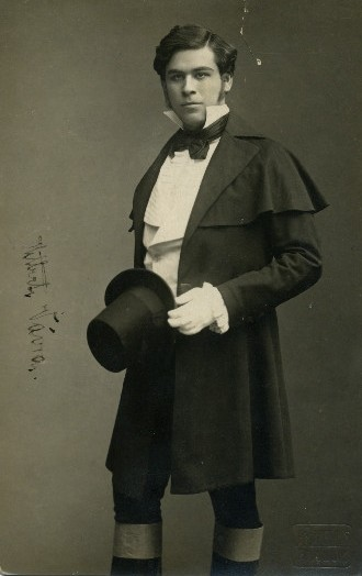 Jan Hilbert Vávra, český operní pěvec, hudební pedagog, malíř a sochař